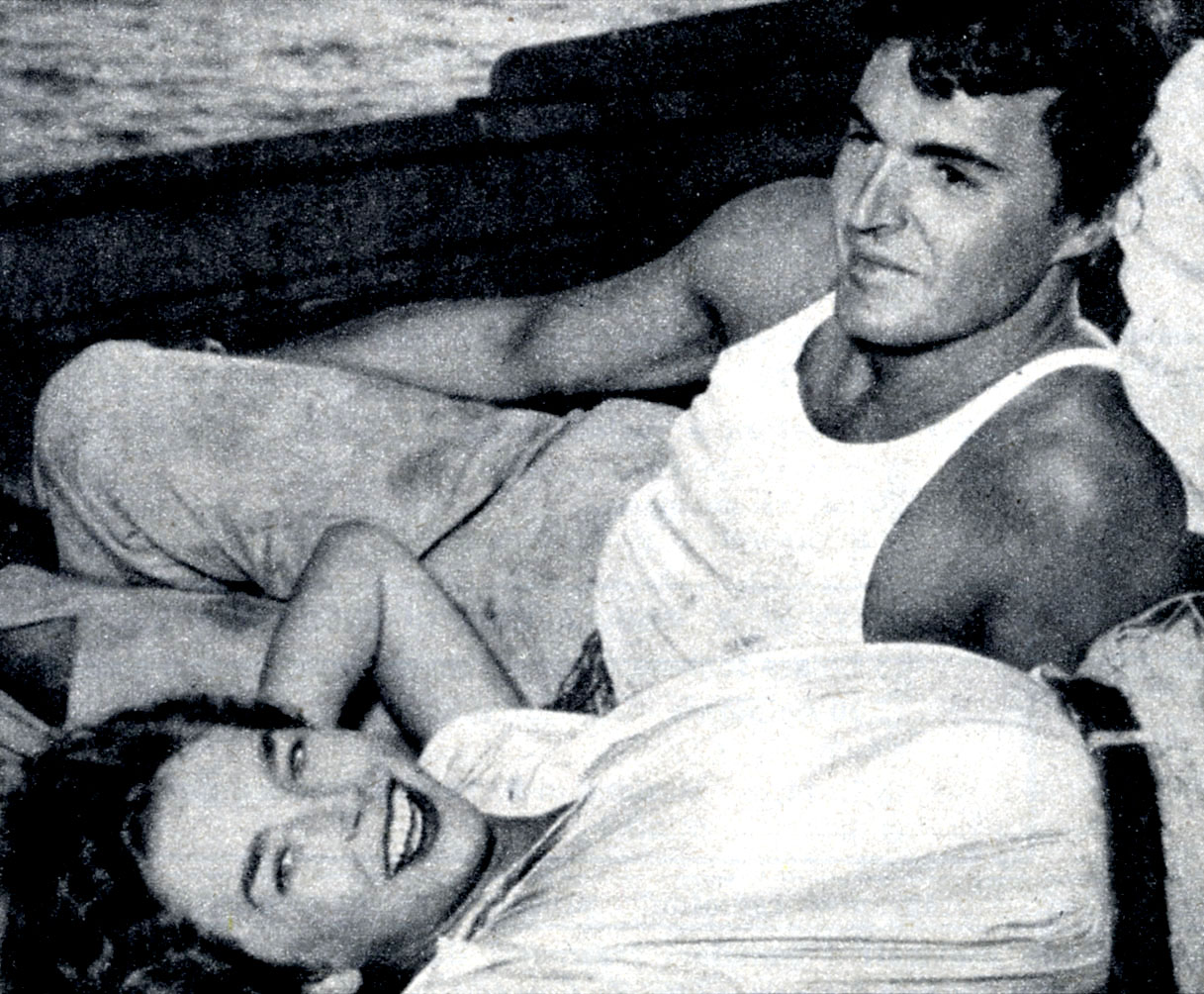 Dawn Addamns e Franco Silva